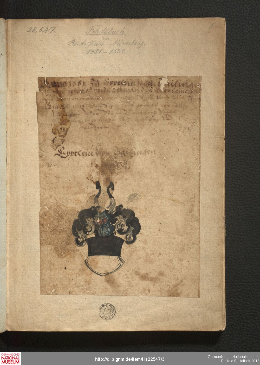 Fehdebuch der Stadt Nürnberg aus den Jahren 1381-1513: Eintrag mit Wappen des Raubritters Eppelein (eigentlich Apollonius) von Gailingen (um 1320-1381), Germanisches Nationalmuseum Nürnberg